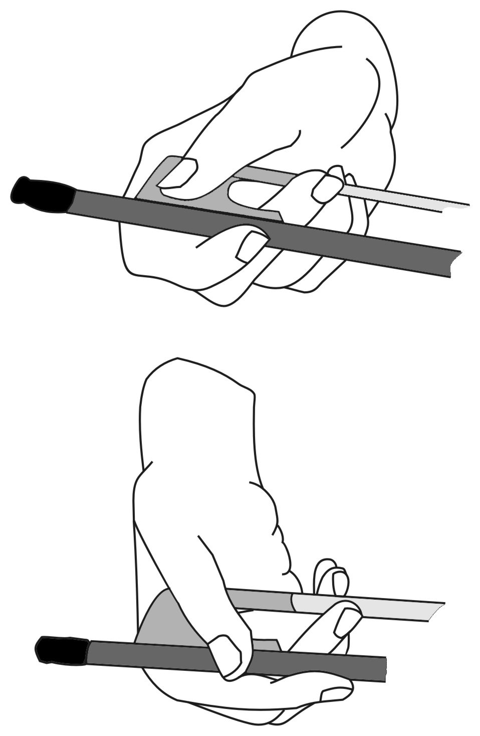 Bogengriffe der Viola da gamba